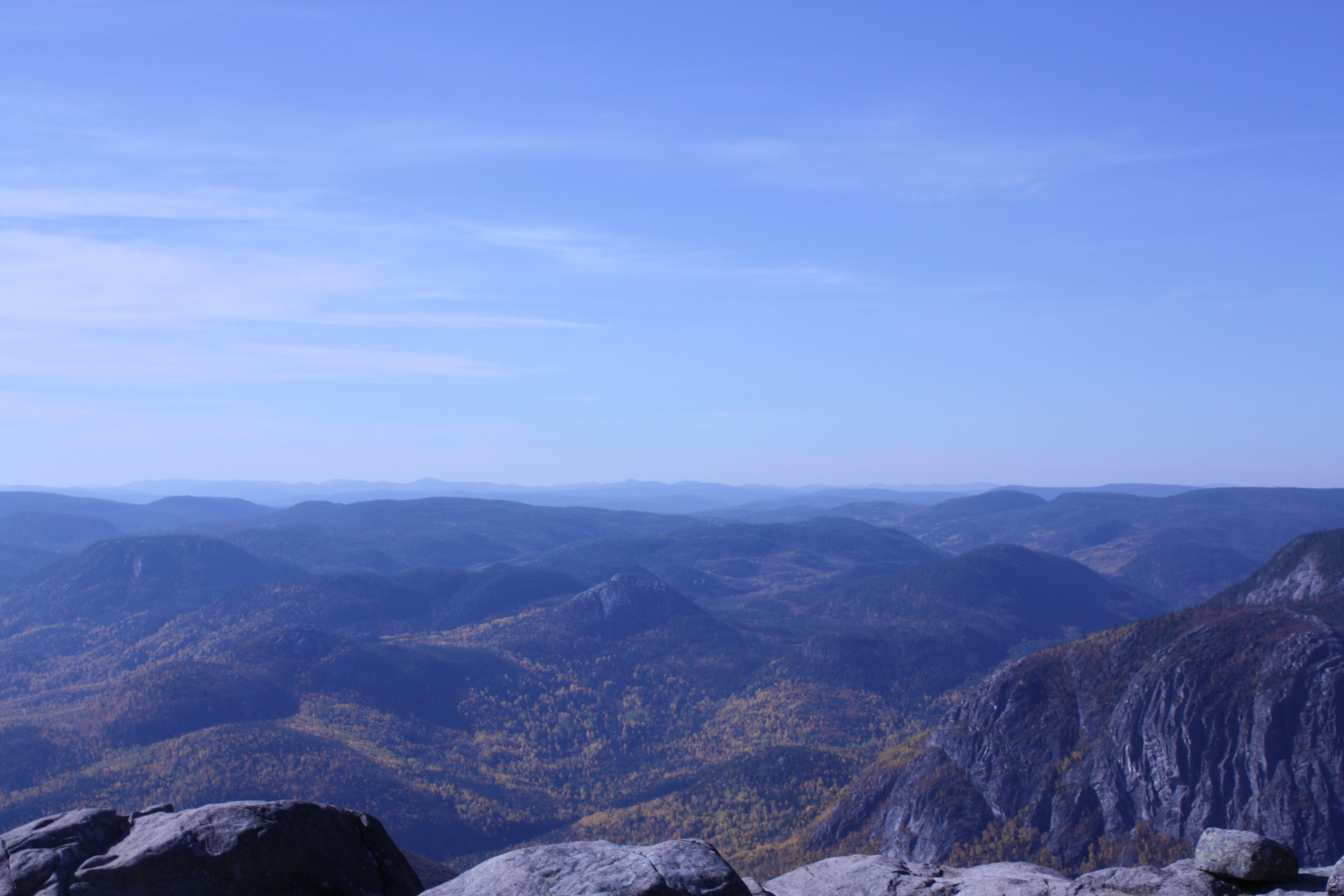 Français cadien: le sommet du lac des cygnes est le trésor du parc des grands jardins